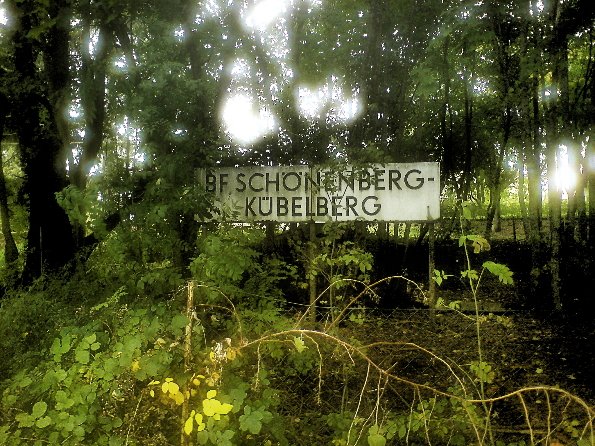 Altes Stationsschild des Bahnhofs von Schönenberg-Kübelberg